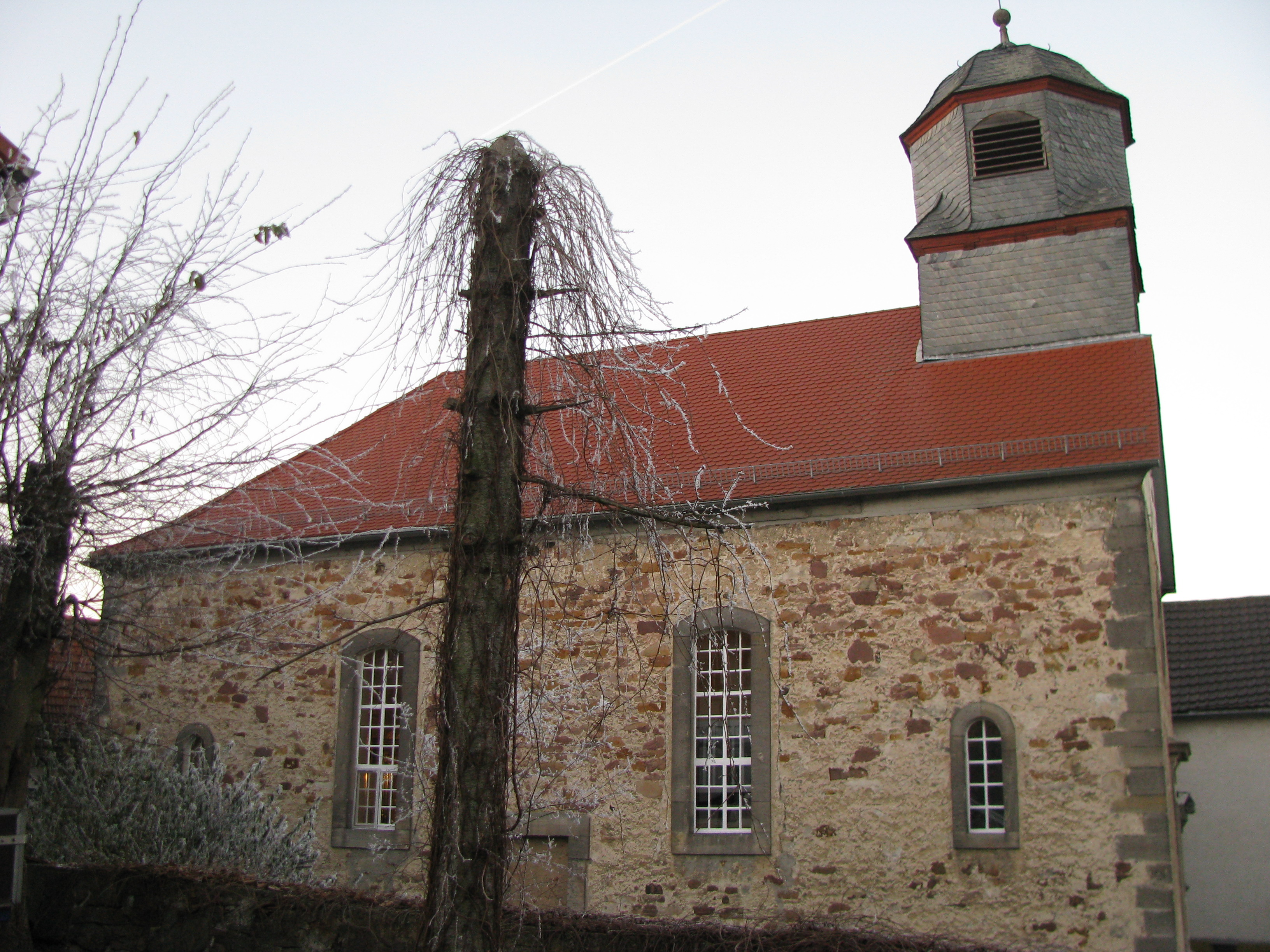 die Kirche von Fuldabrück-Dennhausen von Süden